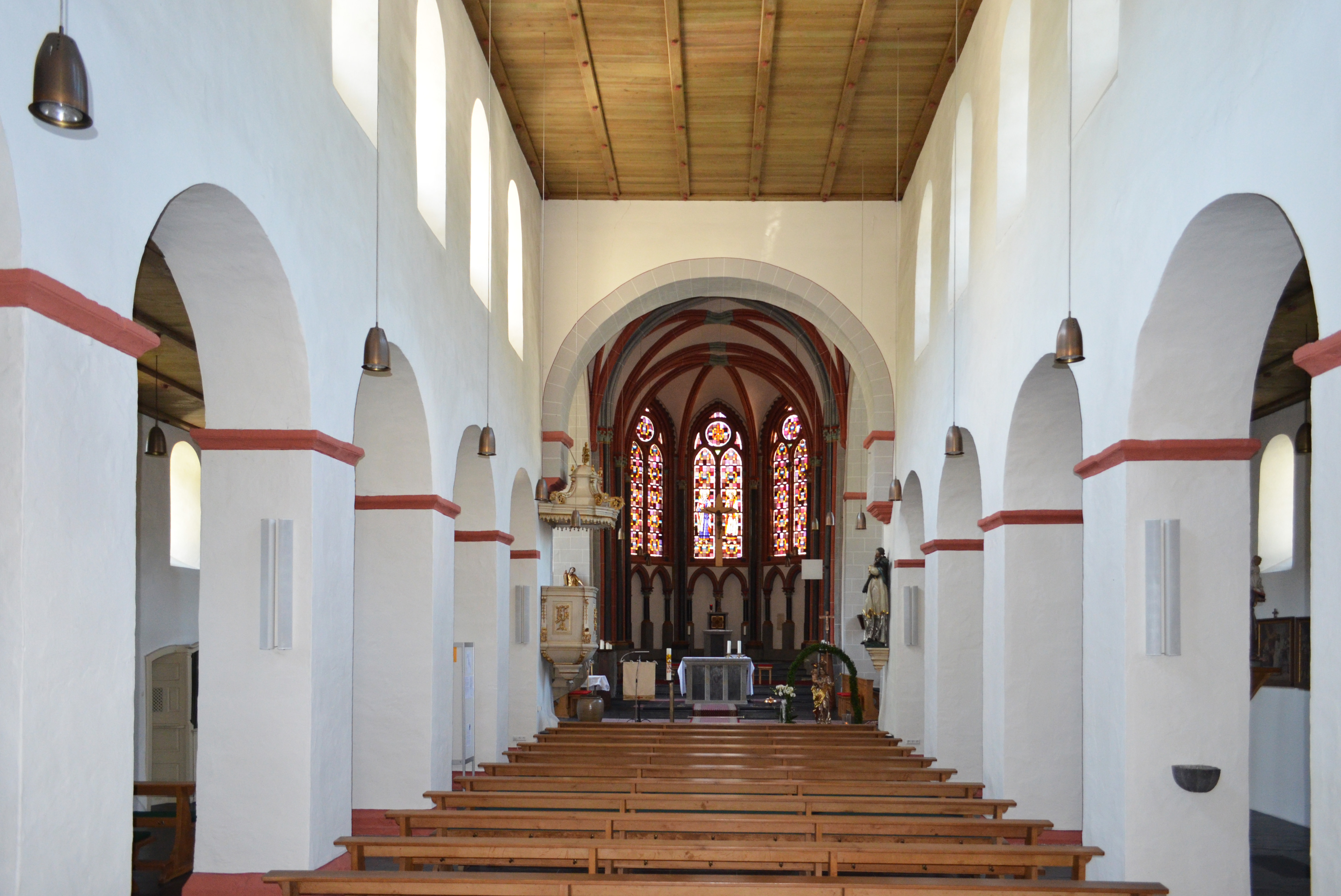 Innenansicht der Kirche St. Bartholomäus in Hirzenach